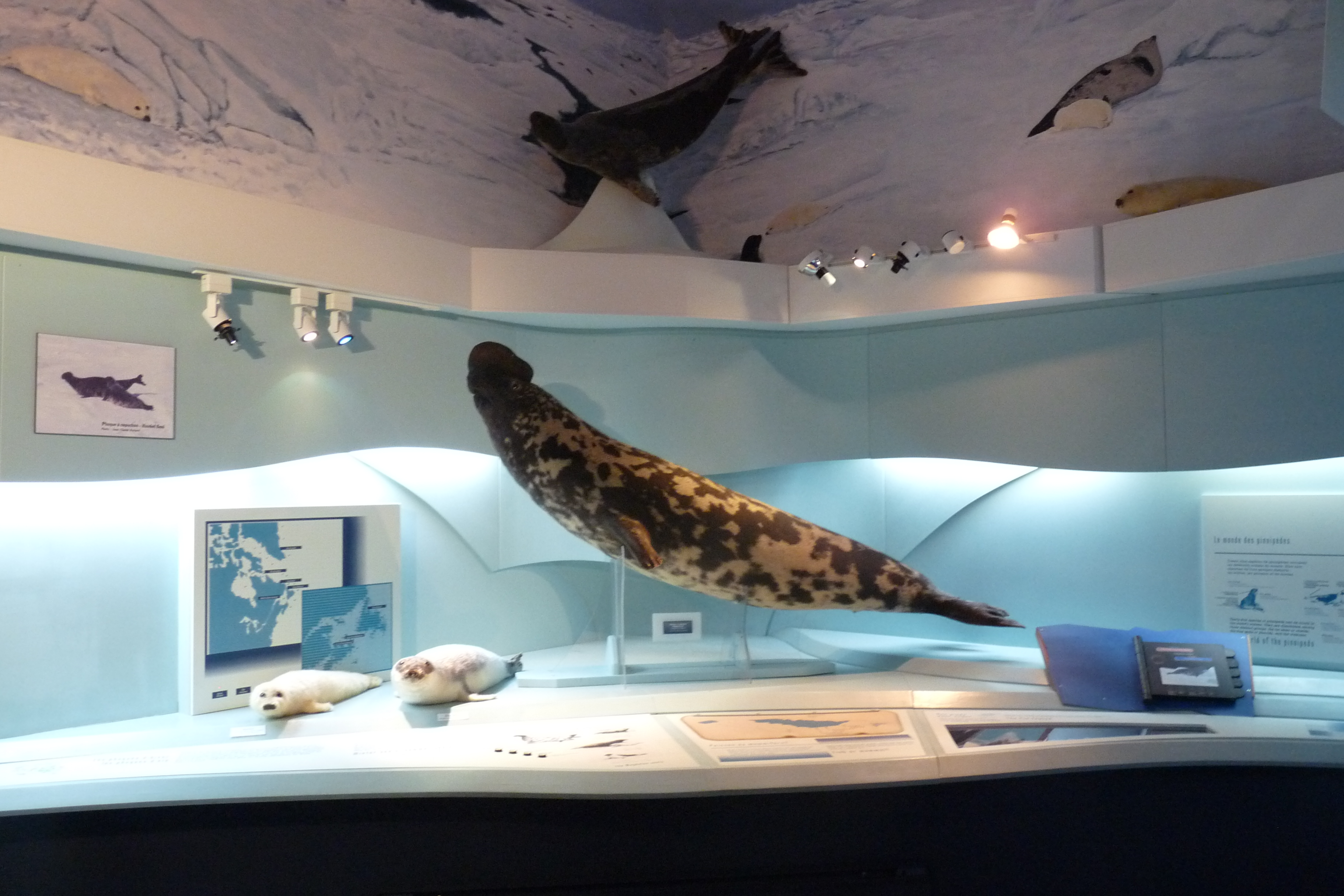 Présentation d'un phoque au Centre d'interprétation du phoque